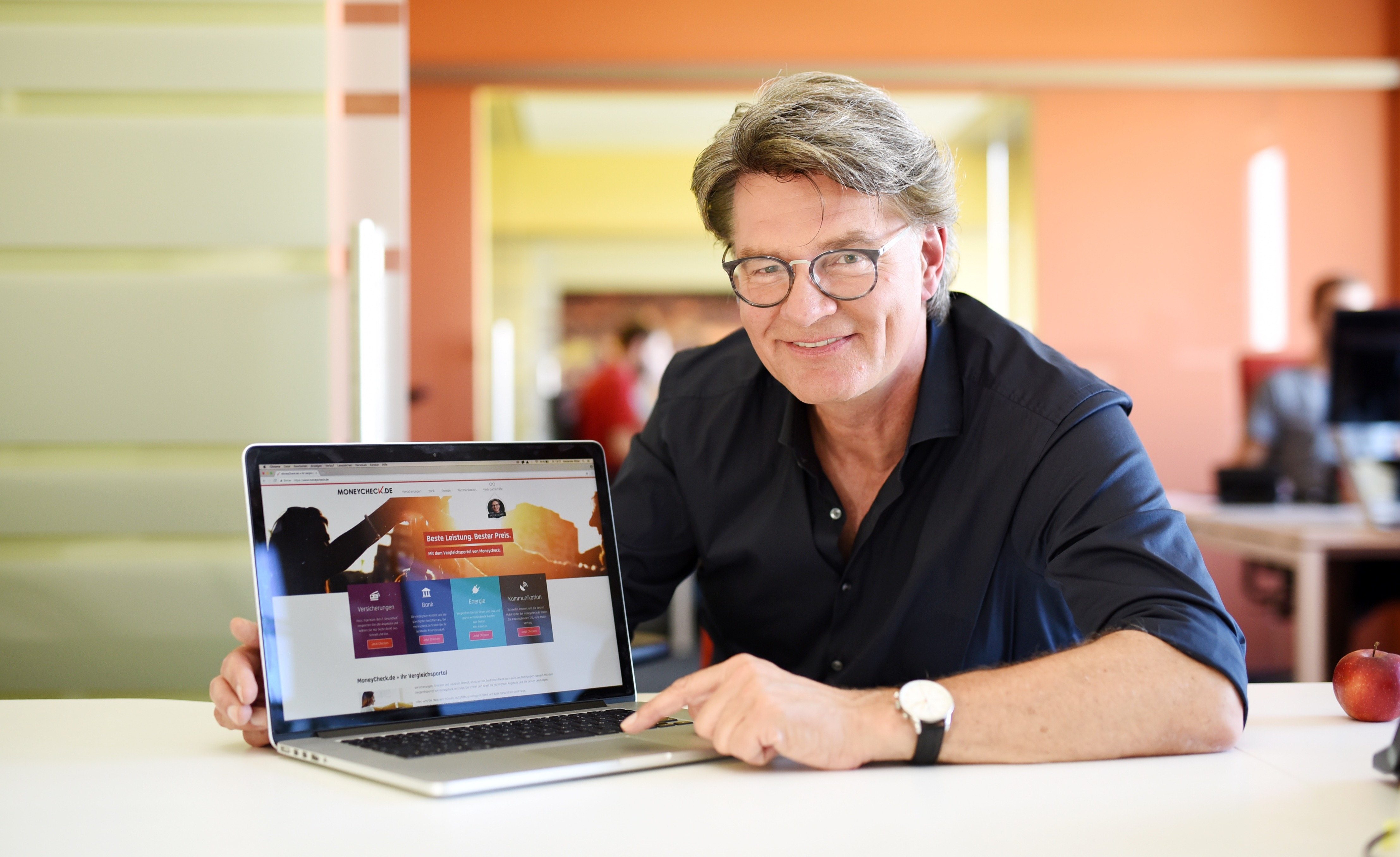 Bild trifft Peter Escher in der Karl-Heine-Straße 99 Hier arbeitet er in einem Büro mit